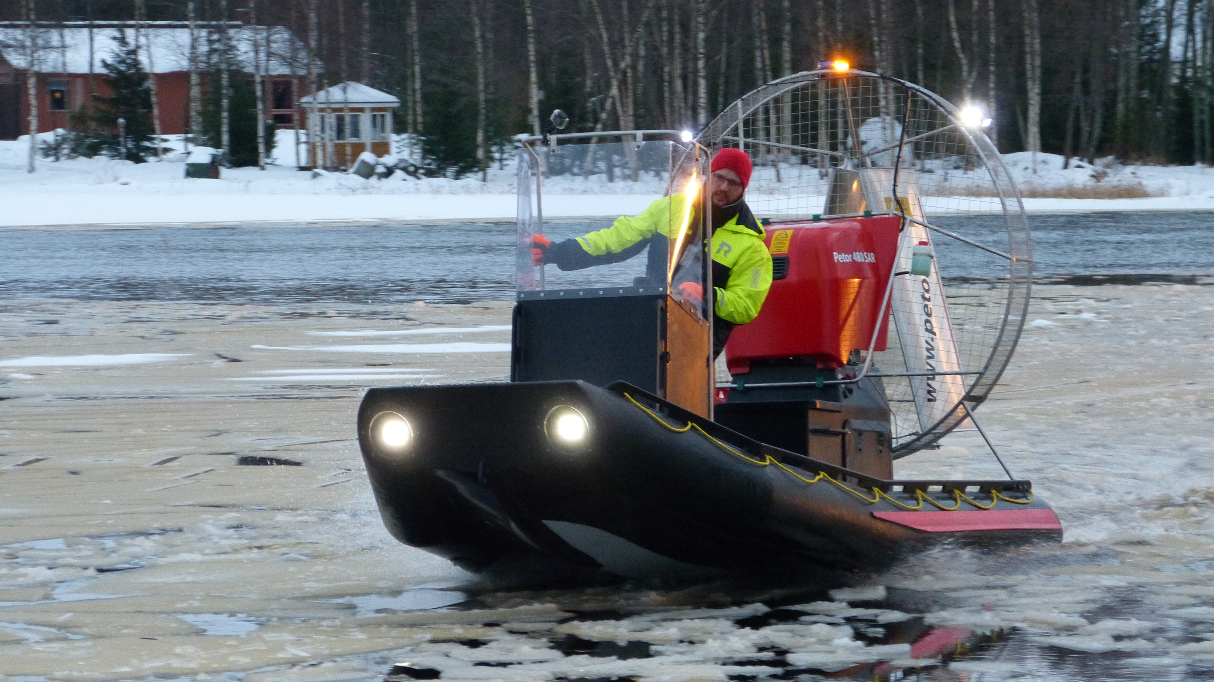 Hydrokopter tillverkad i Larsmo, Finland